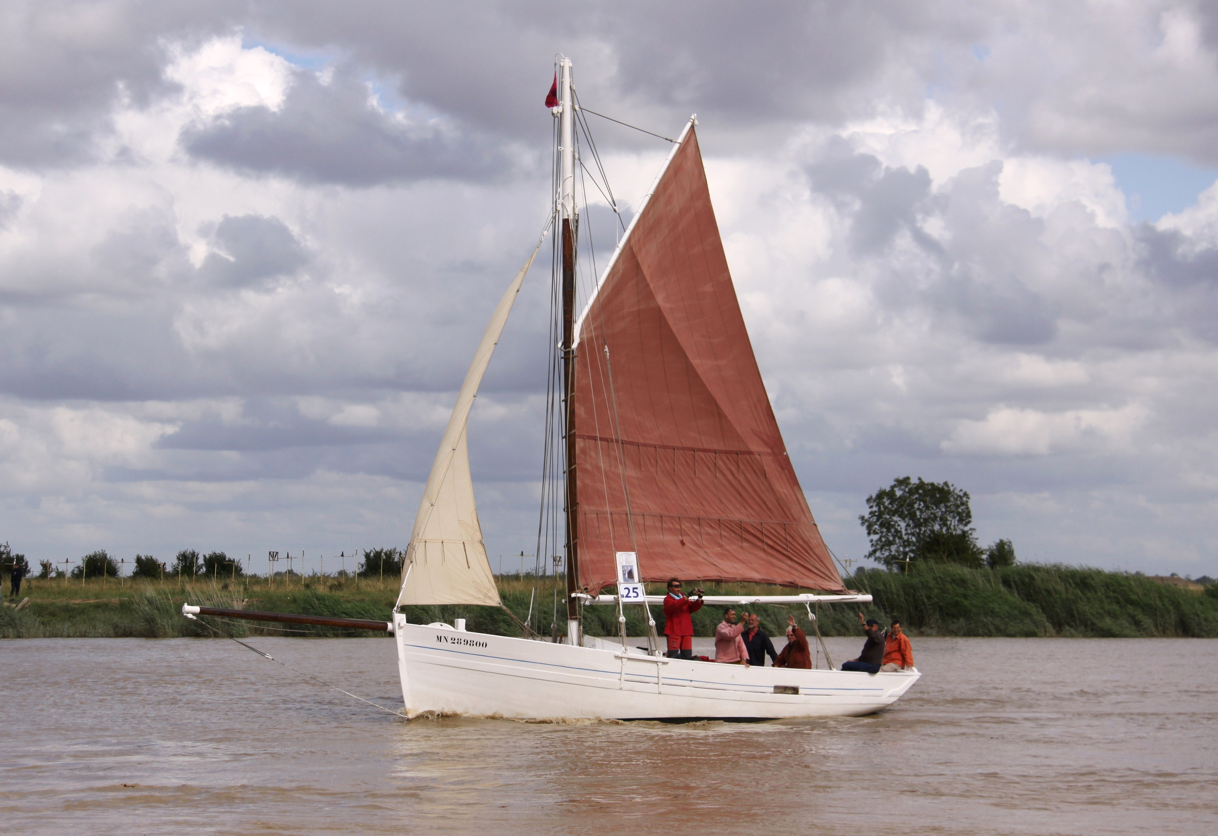 Le sloop ostréicole "La Flèche" en train de remonter la Charente, à Rochefort-sur-Mer, durant la parade nautique de vieux gréements lors de la fête de la mise à l' eau de la frégate "L' Hermione" (réplique de "L' Hermione" de 1779). Ce bateau de pêche a été construit en 1954 au chantier naval Bernard à La Tremblade. Les caractéristiques de ce bateau sont les suivantes: longueur 9,80 mètres (13,50 mètres hors-tout), largeur 3,35 mètres, tirant d'eau 1,40 mètres, hauteur du mât 11 mètres, surface de voilure 88 m² (grand-voile, foc, trinquette, flêche), moteur diesel de 50 cv. Immatriculation MN 289800. Lieu de mouillage: Mornac-sur-Seudre. Rochefort-sur-Mer, Charente Maritime, France.